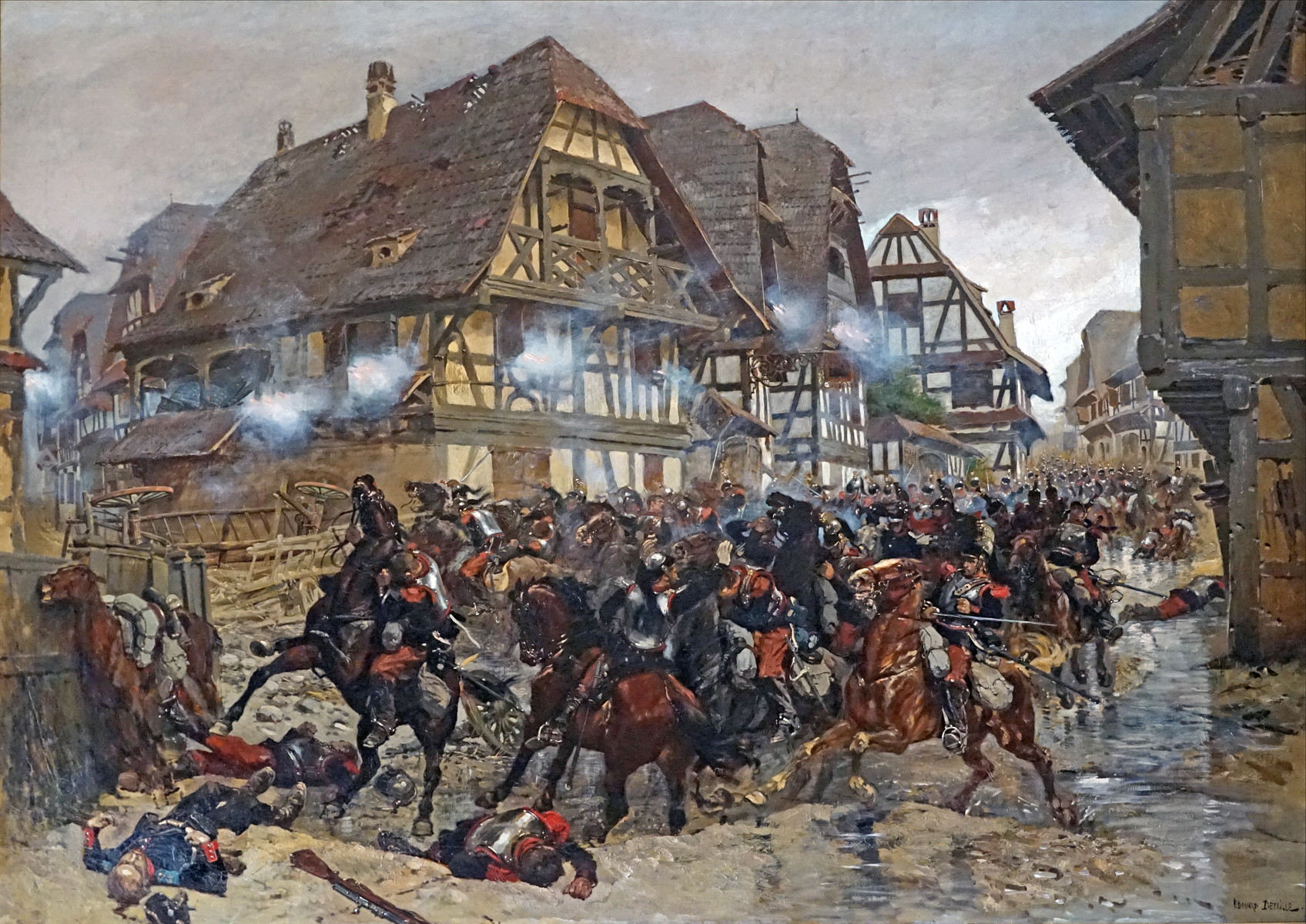 Cette charge n'a pas eu lieu à Reichshoffen mais à Morsbronn dans un village voisin. Les cavaliers ont été piégés et mitraillés dans ce village dont les ruelles étaient bloquées par des chariots. Leur sacrifice aurait permis la retraite du reste de l'armée française. Le musée de la bataille du 6 août 1870 est situé dans l'ancien donjon du château à Woerth en Alsace. Il fait partie des musées du Parc régional des Vosges du nord. Il est consacré à la bataille du 6 août 1870 entre l'armée française (positionnée à Froeschwiller) et les armées allemandes coalisées autour de la Prusse (positionnées à Woerth). Le nom de Reichshoffen lui a été historiquement associé alors qu'elle ne s'y est pas déroulée. Cette bataille, qui a fait 20.000 morts dans les deux camps, marque le début de la guerre franco-allemande de 1870-1871 perdue par la France et qui a abouti à l'annexion par l'Allemagne de l'Alsace et de la Lorraine (région de Metz). Les répercussions de cet affrontement ont été considérables car les deux grandes guerres, qui se sont produites au XXè siècle, en sont le prolongement. Le musée de Woerth vient de rouvrir après une période de rénovation. La visite du musée peut être complétée par celle du champ de bataille et des monuments français et surtout allemands qui y ont été érigés. En effet, cette région a fait l'objet durant l'occupation allemande jusqu'en 1918 d'un tourisme important de la part des allemands venant célébrer le sacrifice de leurs soldats.